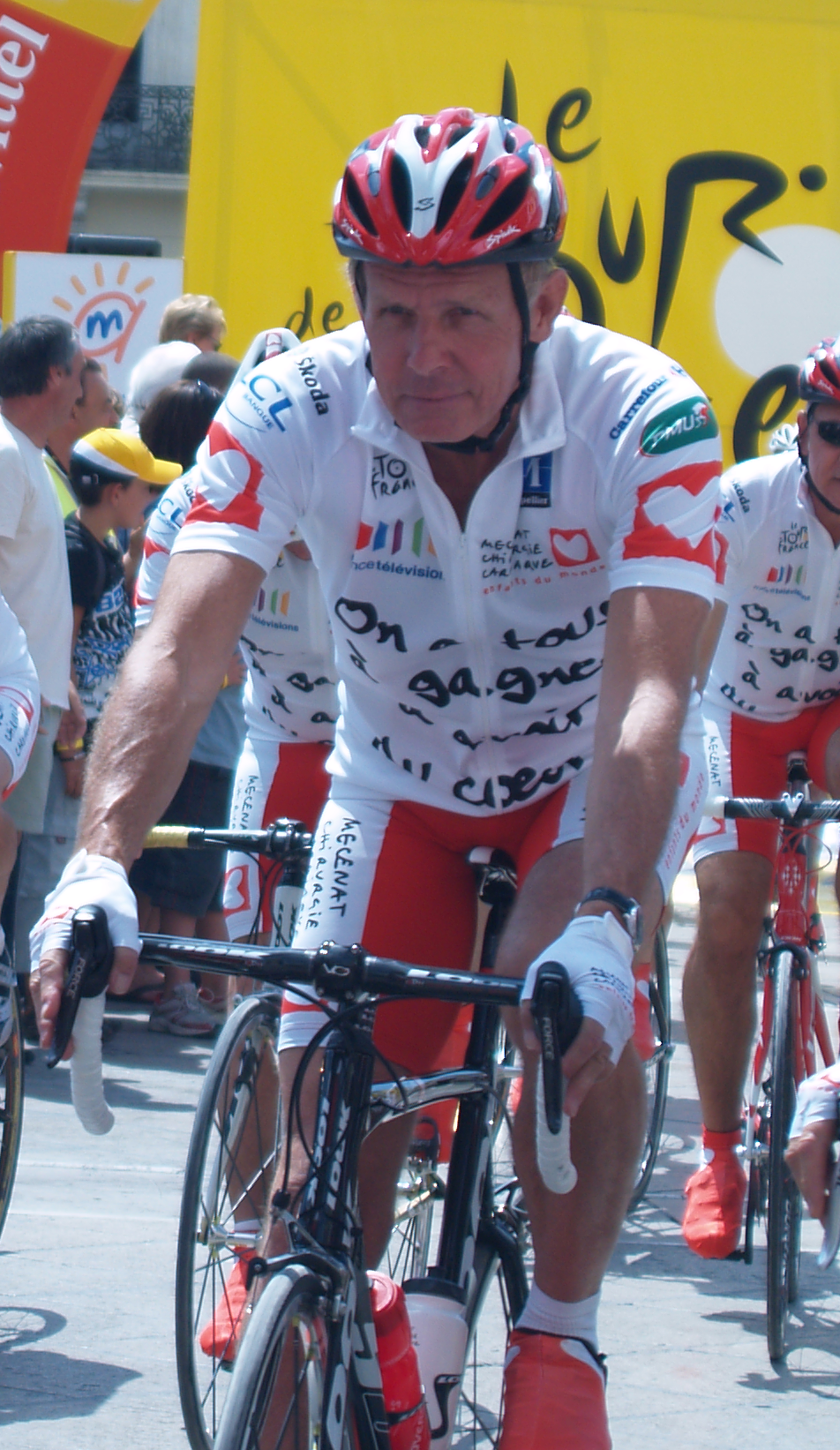 Patrick Poivre d'Arvor lors de l'opération "On a tous un coeur" place de la comédie à Montpellier durant le tour de France 2009.